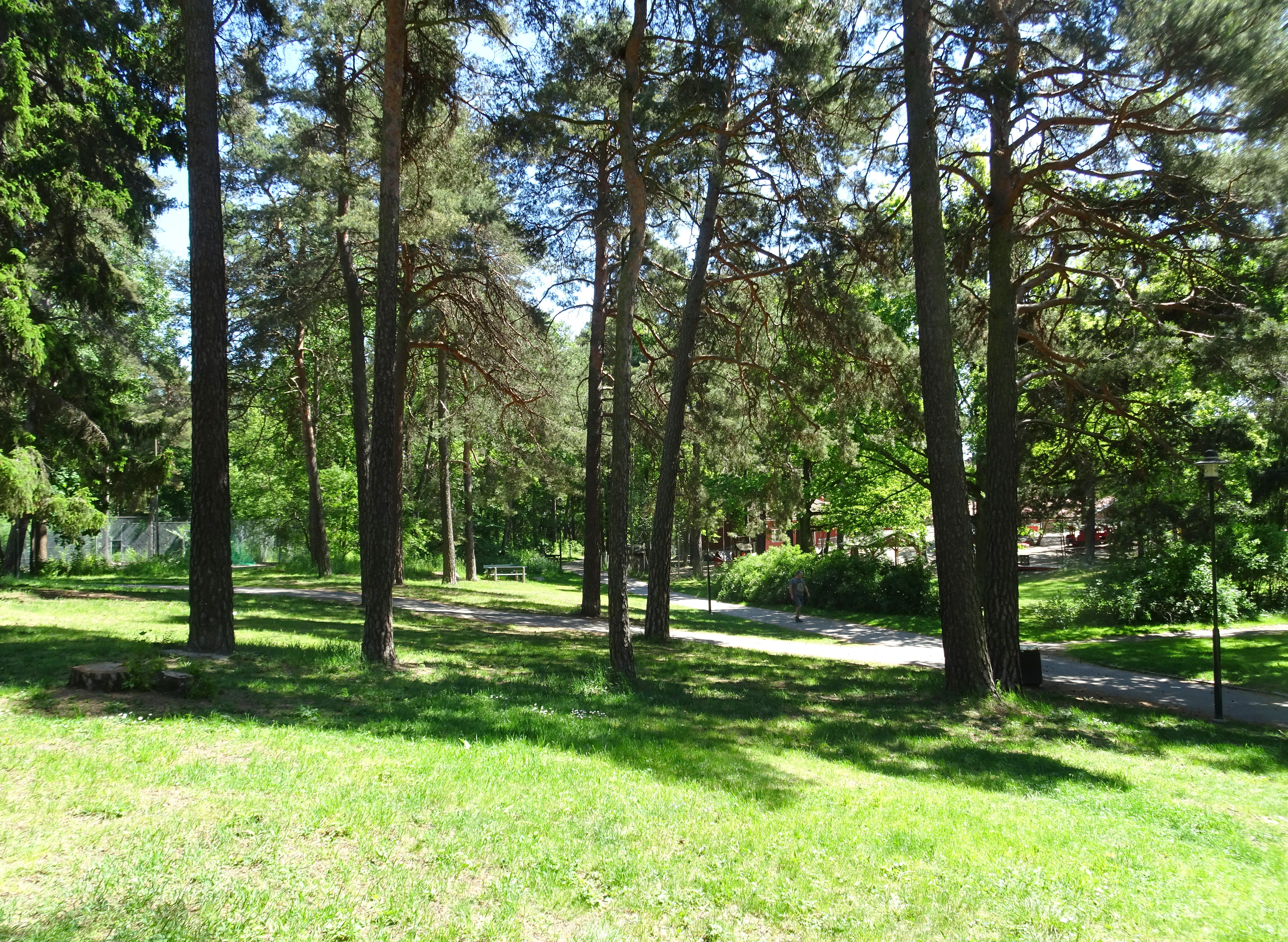 Bostadsområdet Näckrosen, Råsunda (Näckrosparken)